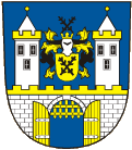 Znak města Česká Lípa